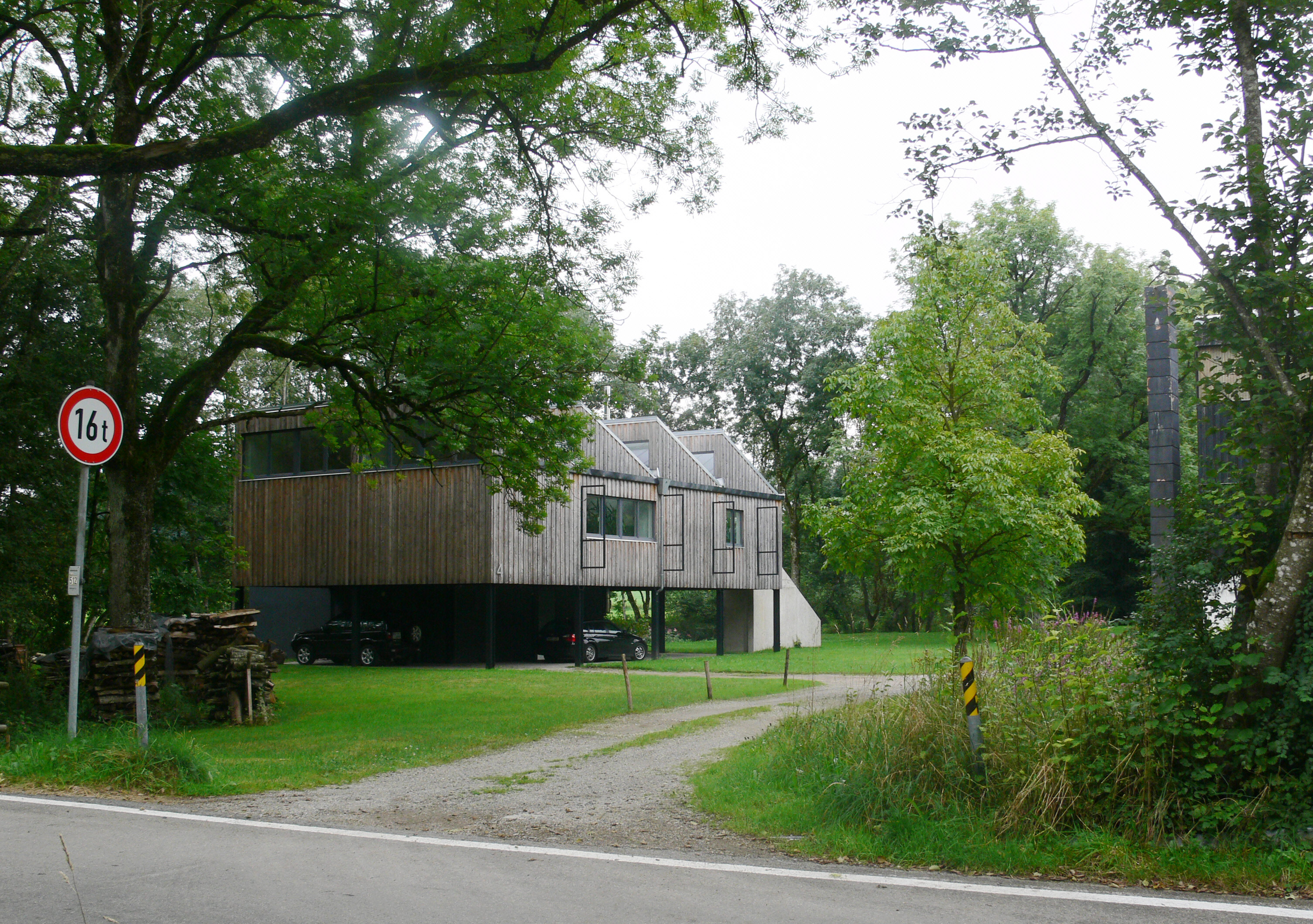 Rotis, Ortsteil von Leutkirch im Allgäu, bekannt als Wohnort von Otl Aicher und Namensgeber seiner Schriftart „rotis“